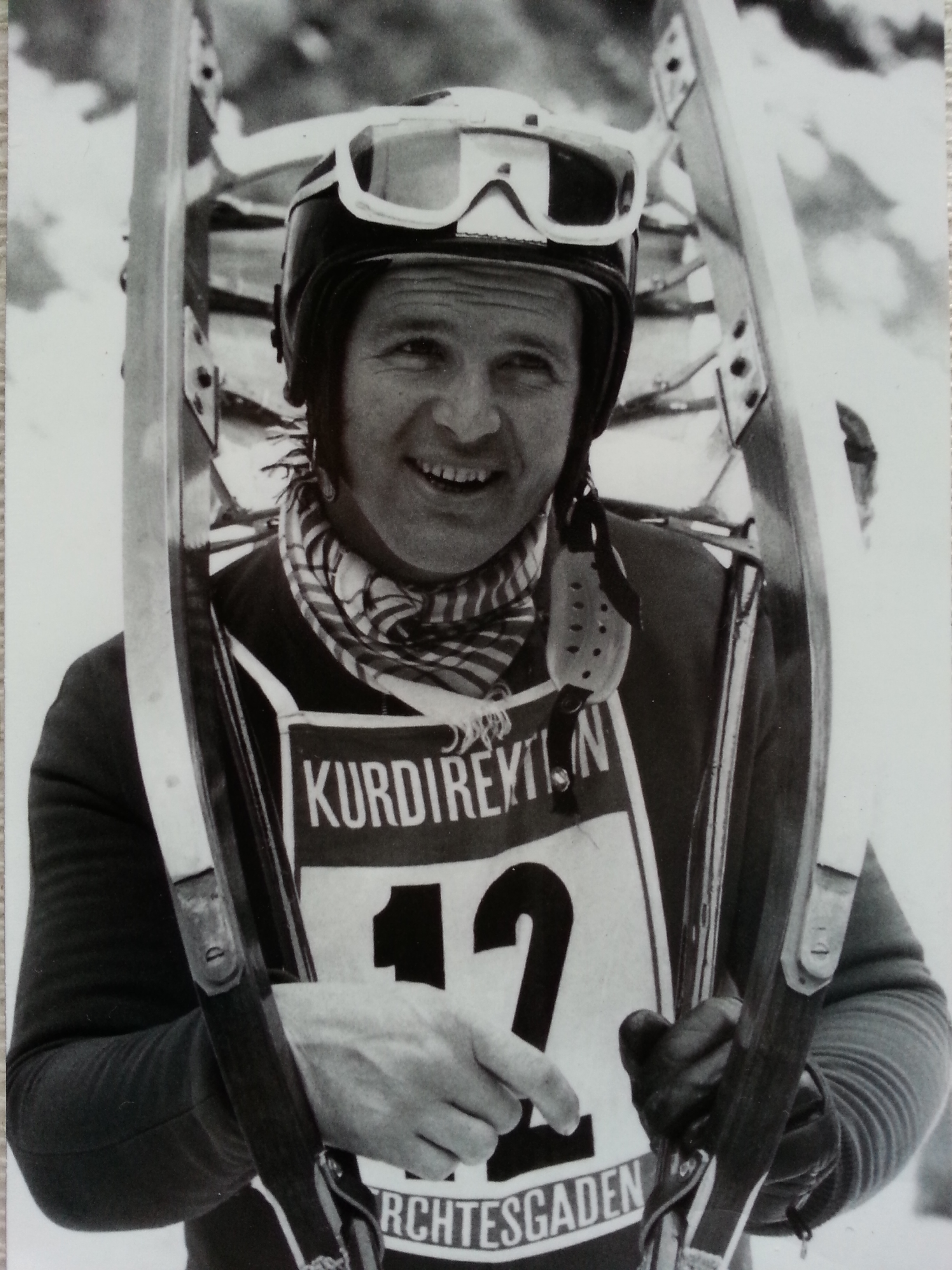 Leonhard Nagenrauft, Wintersportler Rennrodeln Deutschland